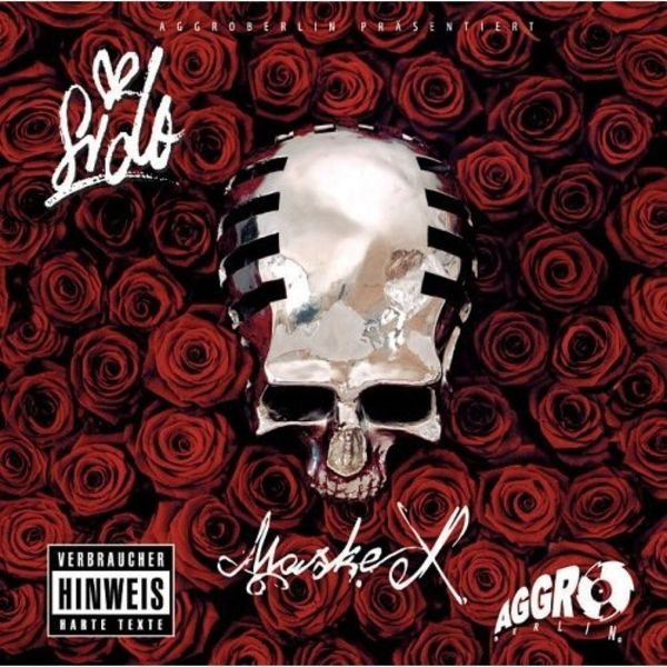 Cover des Albums „Maske X“